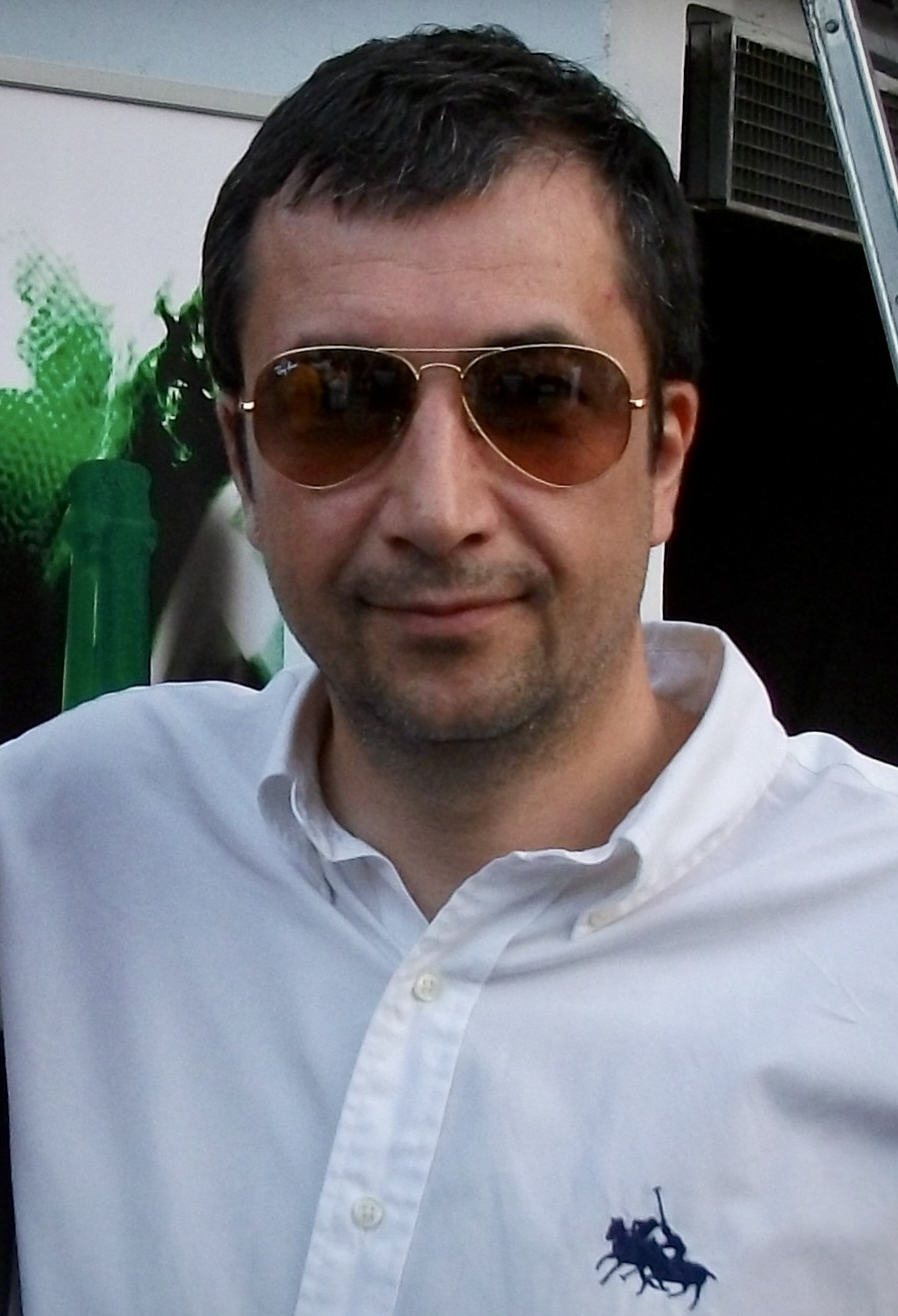 Luca Banchi durante i festeggiamenti del 21 giugno 2013 per lo scudetto 2012/13 vinto della Mens Sana Basket.